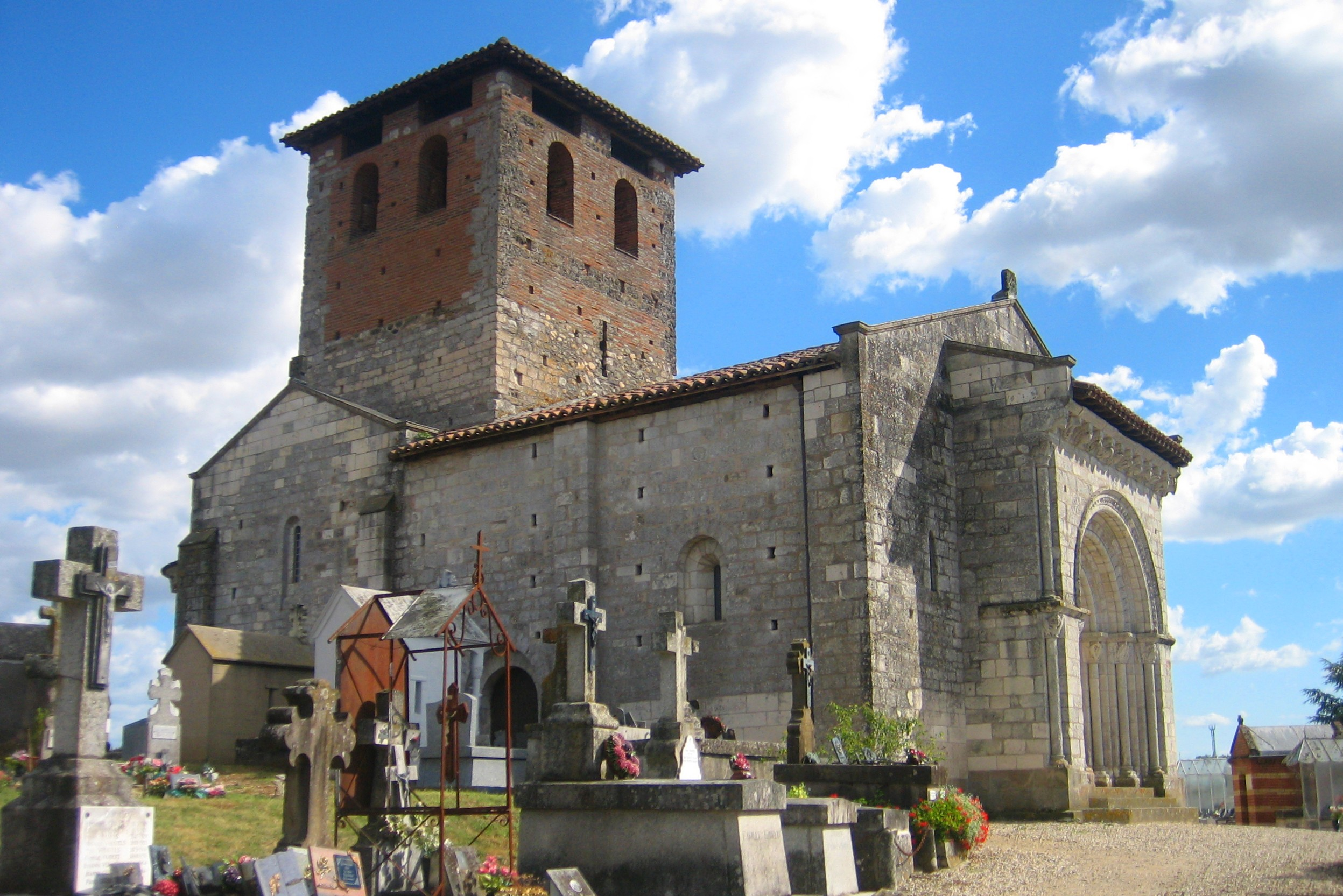 L'église Saint-Michel de Lescure d'Albigeois. .